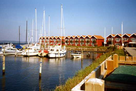 Ebeltoft